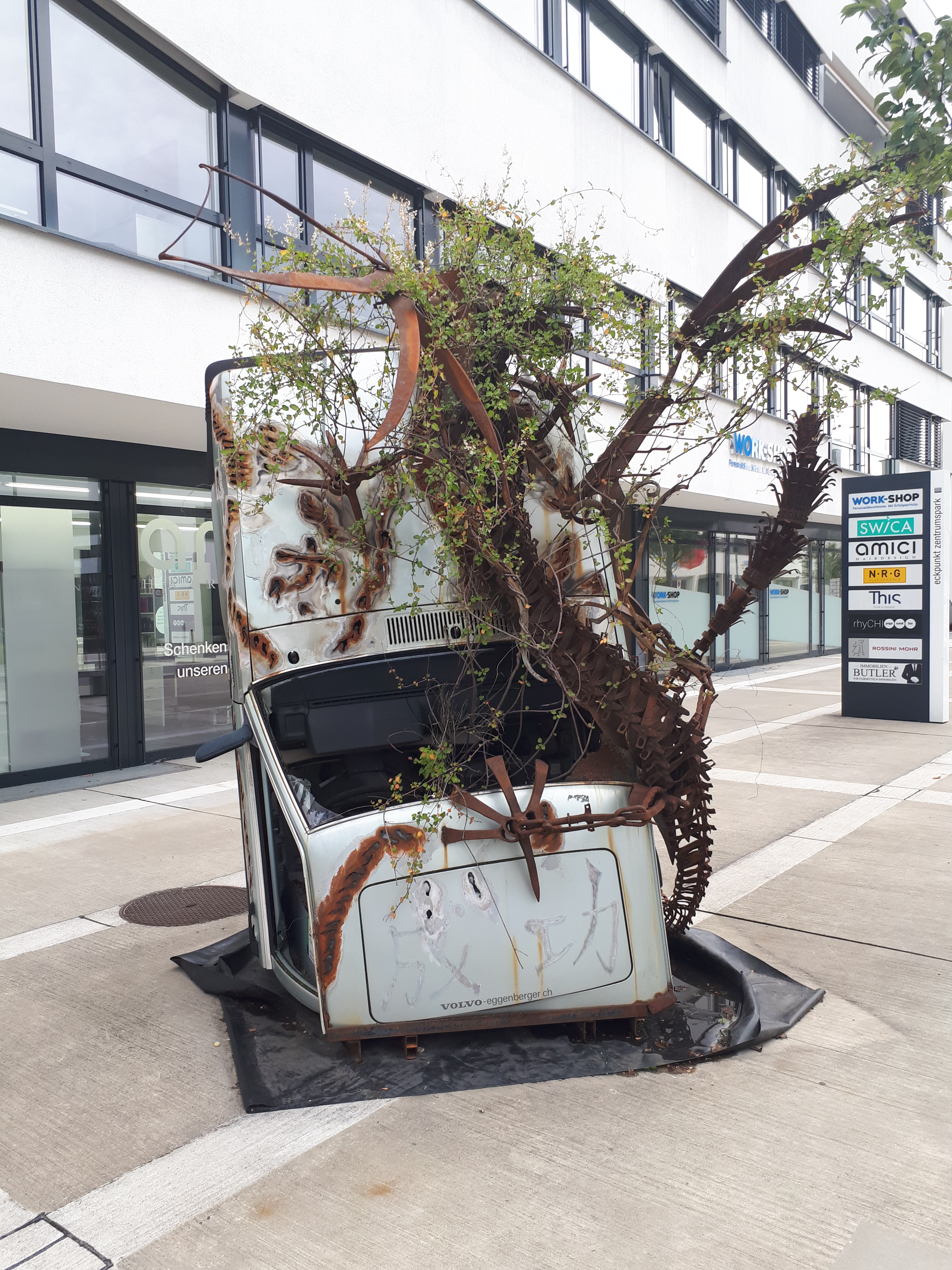 Kunstwerk von Silan Köppel. Entstanden 2017 in Berneck, anläslich der Übernahme von Volvo.